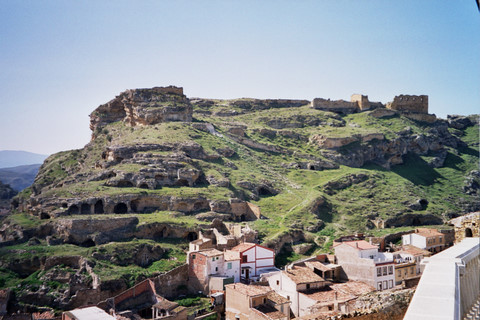 Castillo de Cervera del Río Alhama